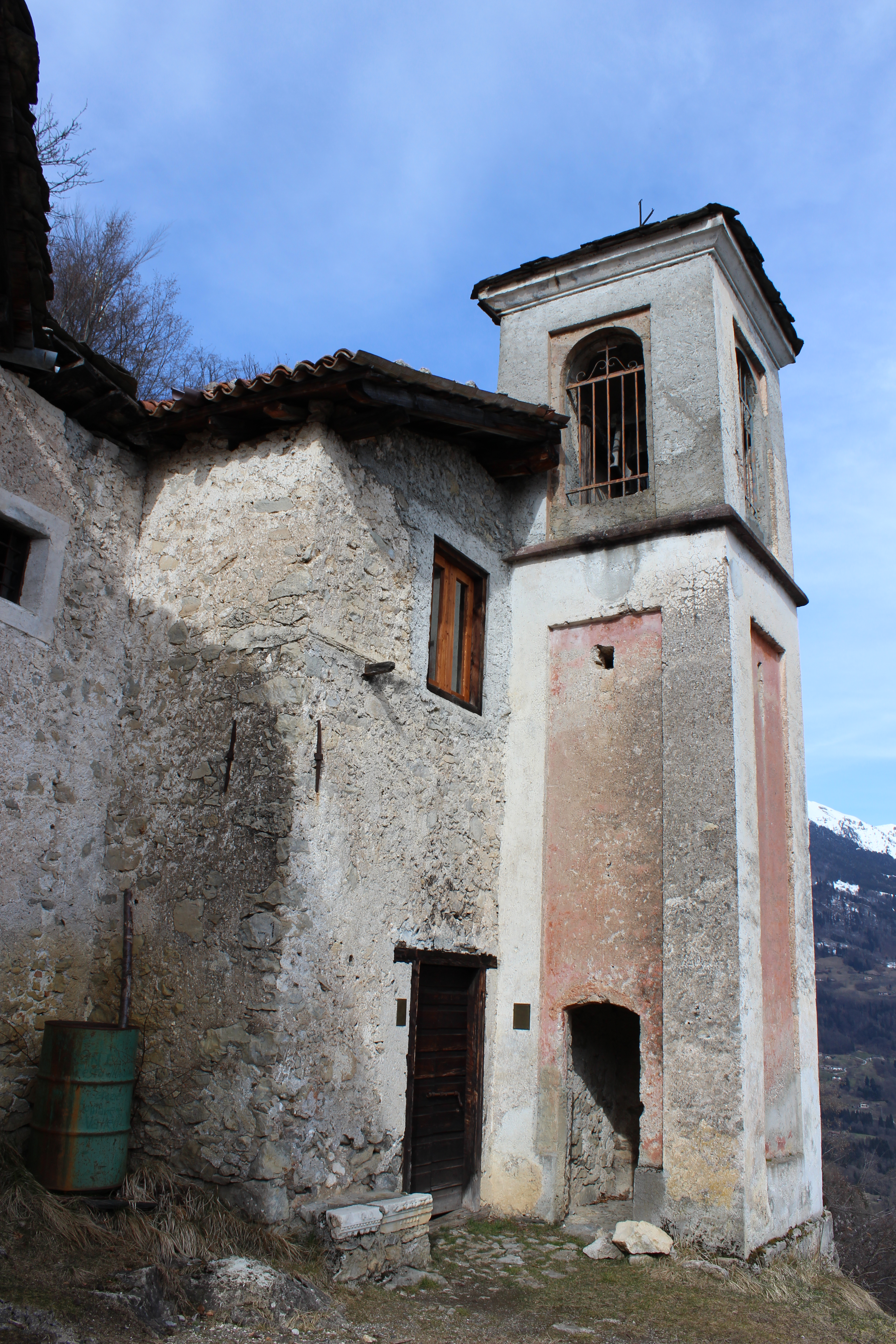 Chiesa di San Gervasio e Protasio (Bagolino).